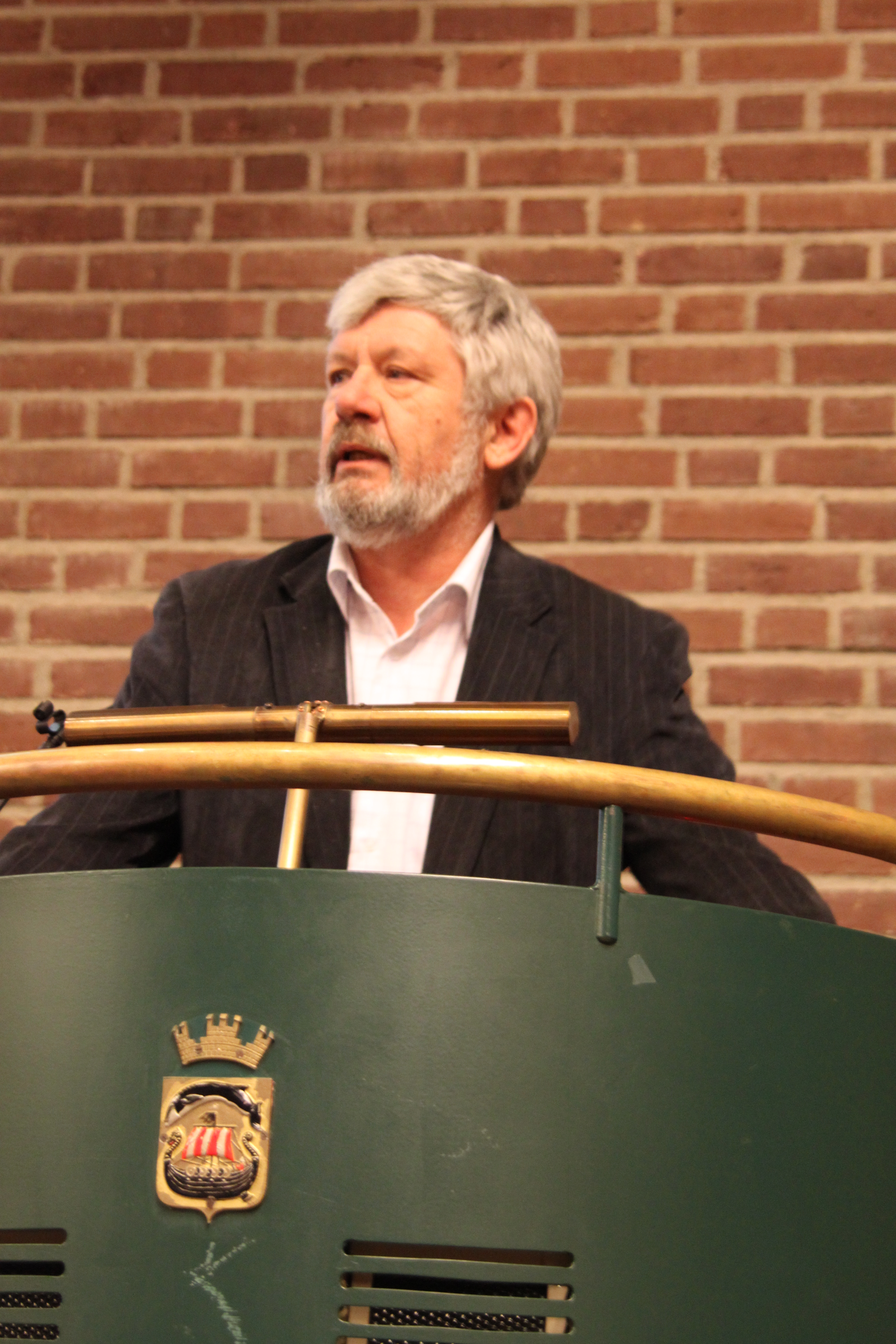 Vidar Andersen, varaordfører i Sandefjord kommune